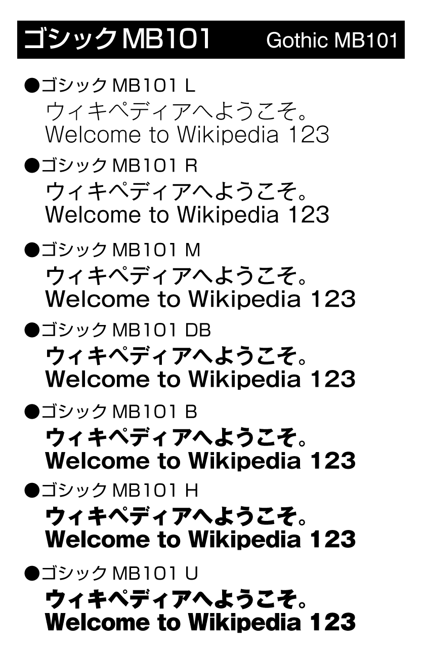 ゴシックMB101の書体見本